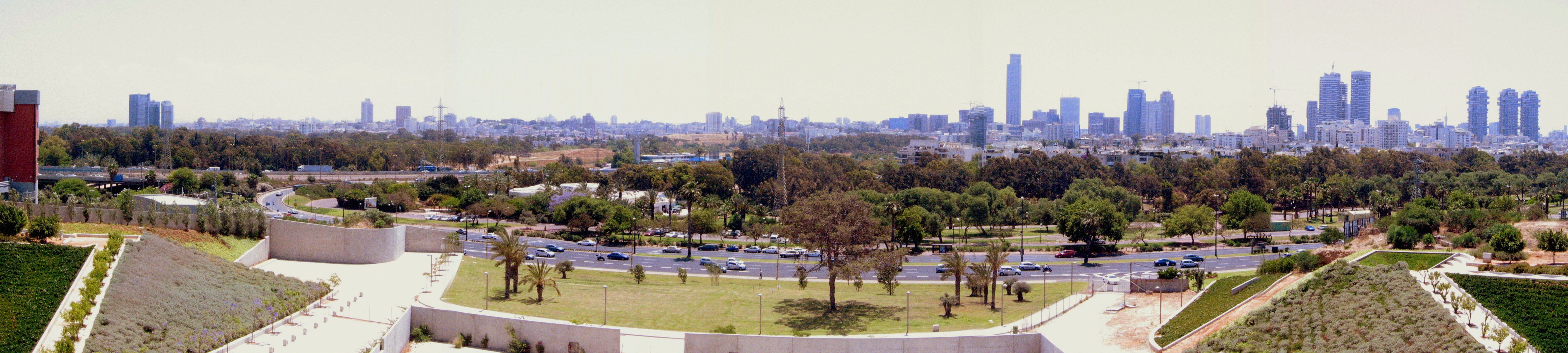 Yitzhak Rabin Center, Tel Aviv